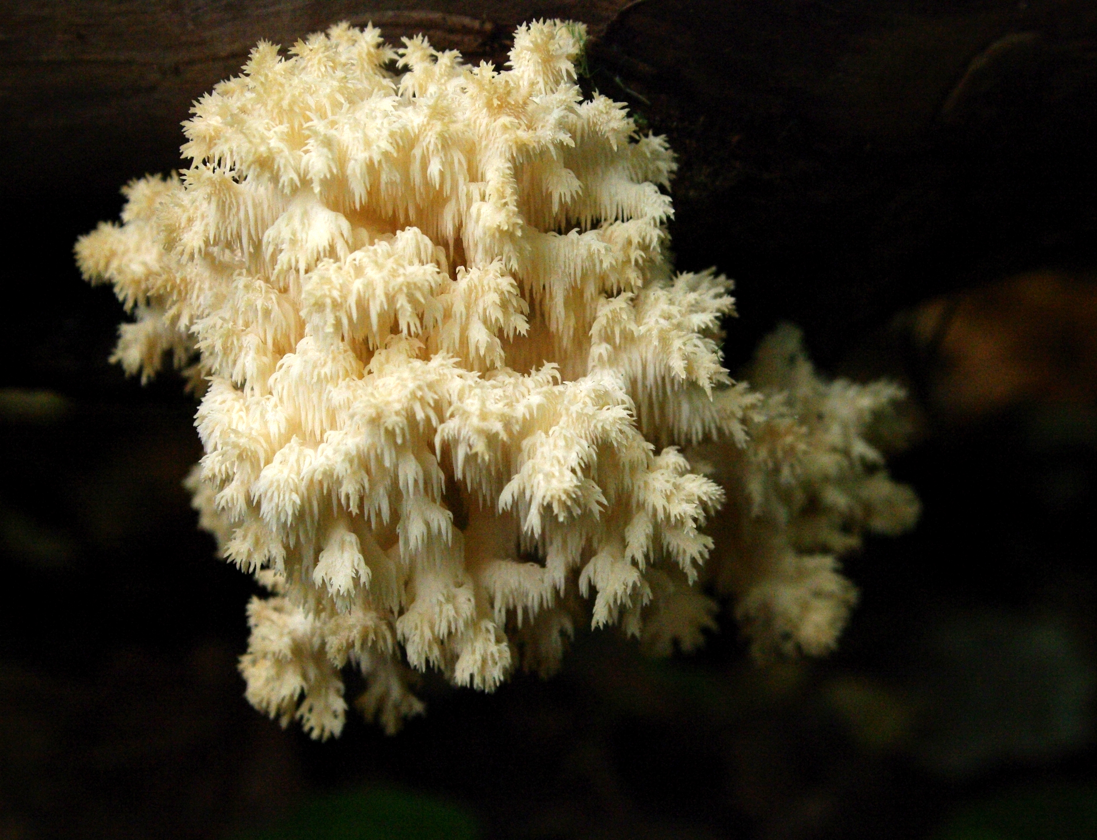 Korallnarmik